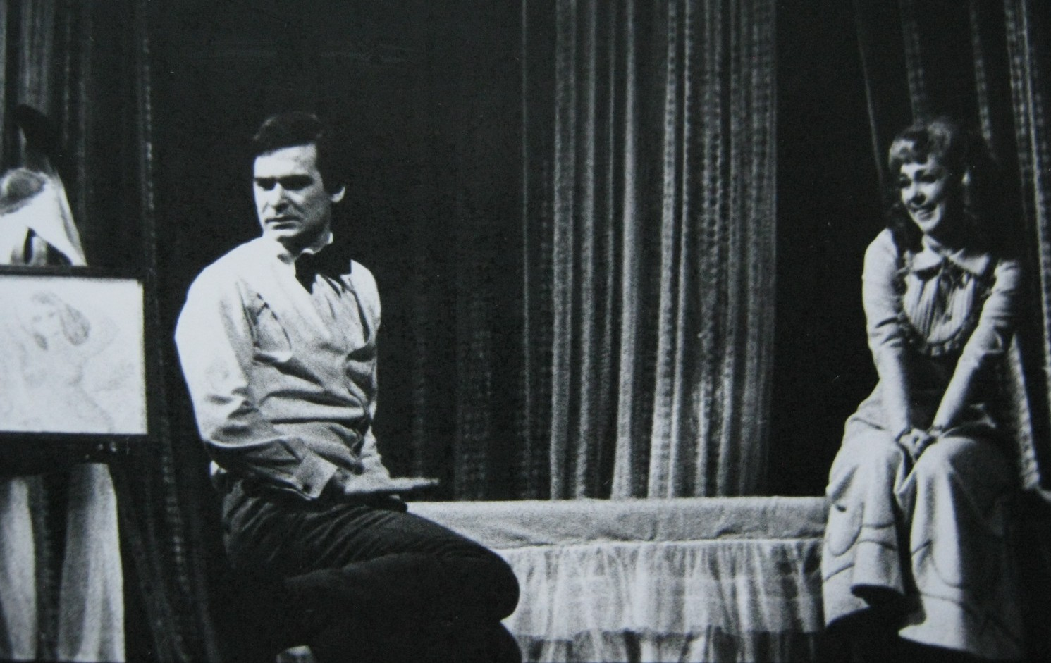 Сцена из спектакля «Ужасные родители» Ленинградского государственного театра Эстрады в роли Мишеля Николай Буров, в роли Мадлен Валентина Панина, режиссёр-постановщик Геннадий Егоров